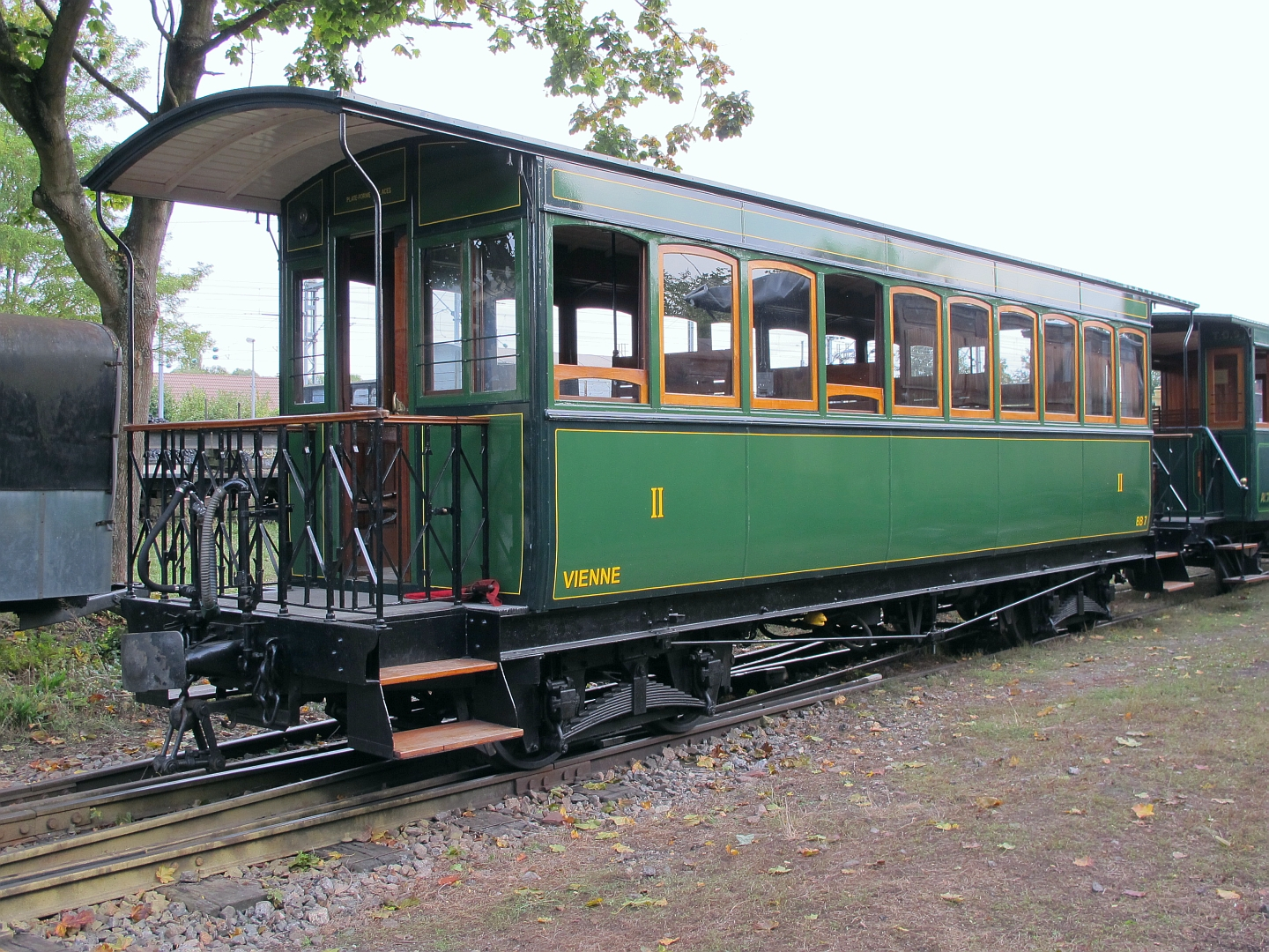 La voiture à bogies N°BB7 des Voies ferrées économiques du Poitou (VFEP), au Musée des tramways à vapeur et des chemins de fer secondaires français, à Butry-sur-Oise le 7 octobre 2012.